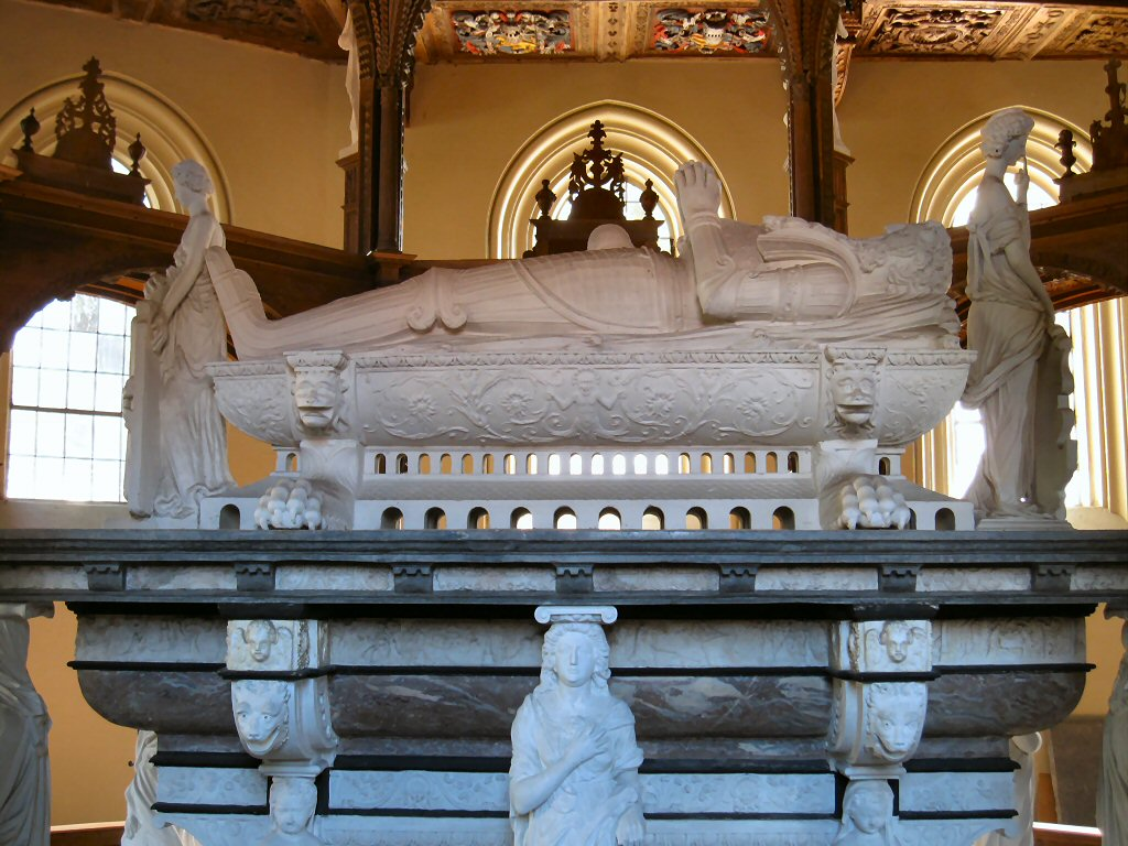 Edo-Wiemken-Grabmal in der Stadtkirche von Jever